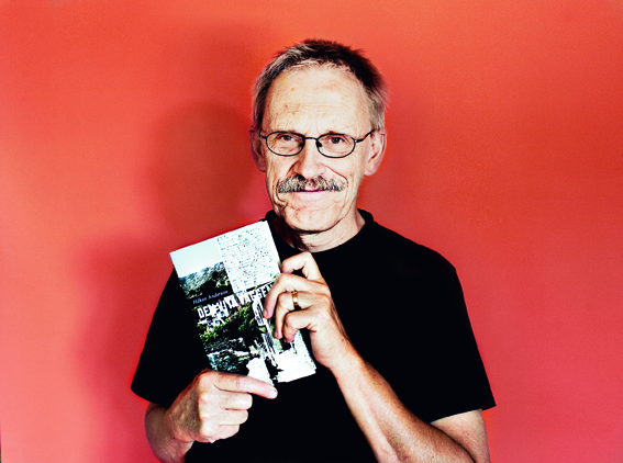 Författaren Håkan Anderson.